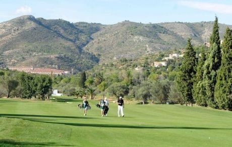 Club de Campo del Mediterranéo in Valencia